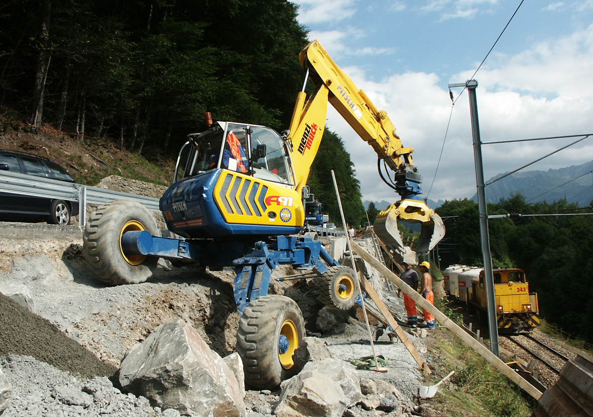 Schreitbagger Menzi Muck A91 beim Einsatz am Hang zwischen Bahnlinie und Straße.